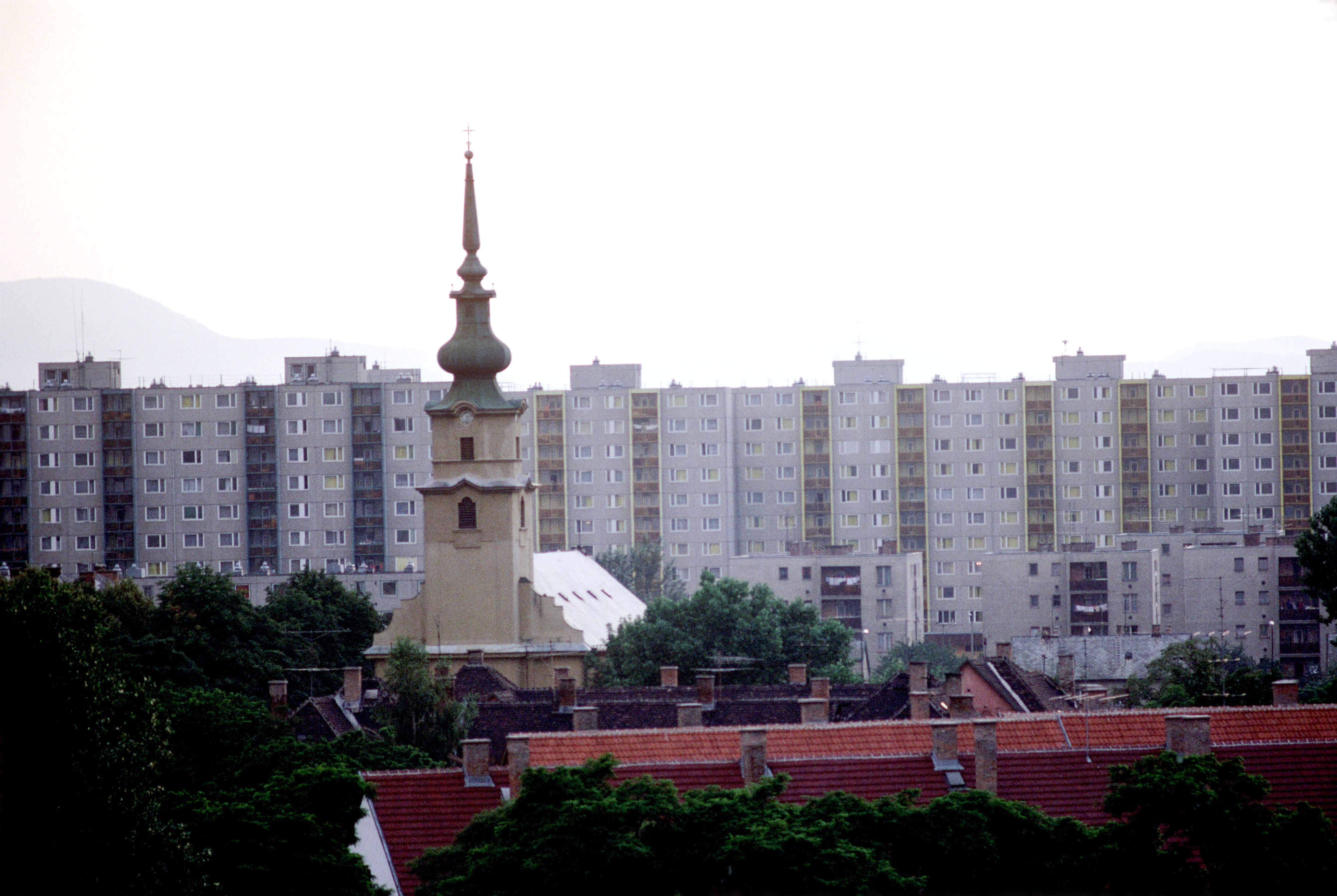 L’église Cœur de Jésus (Jézus Szíve templom) et à l’arrière plan, les barres d’immeubles d’habitation situés rue Garas. Mercredi 3 juillet 1985. Dunakeszi, comitat de Pest, Hongrie.